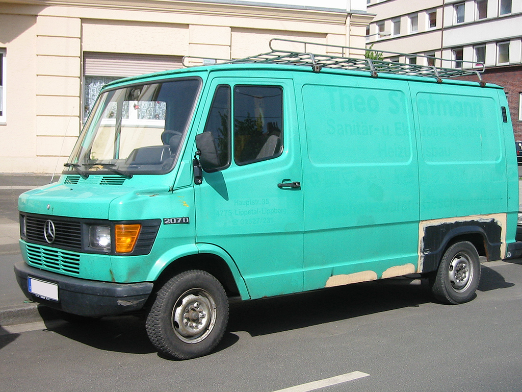 Mercedes T 1